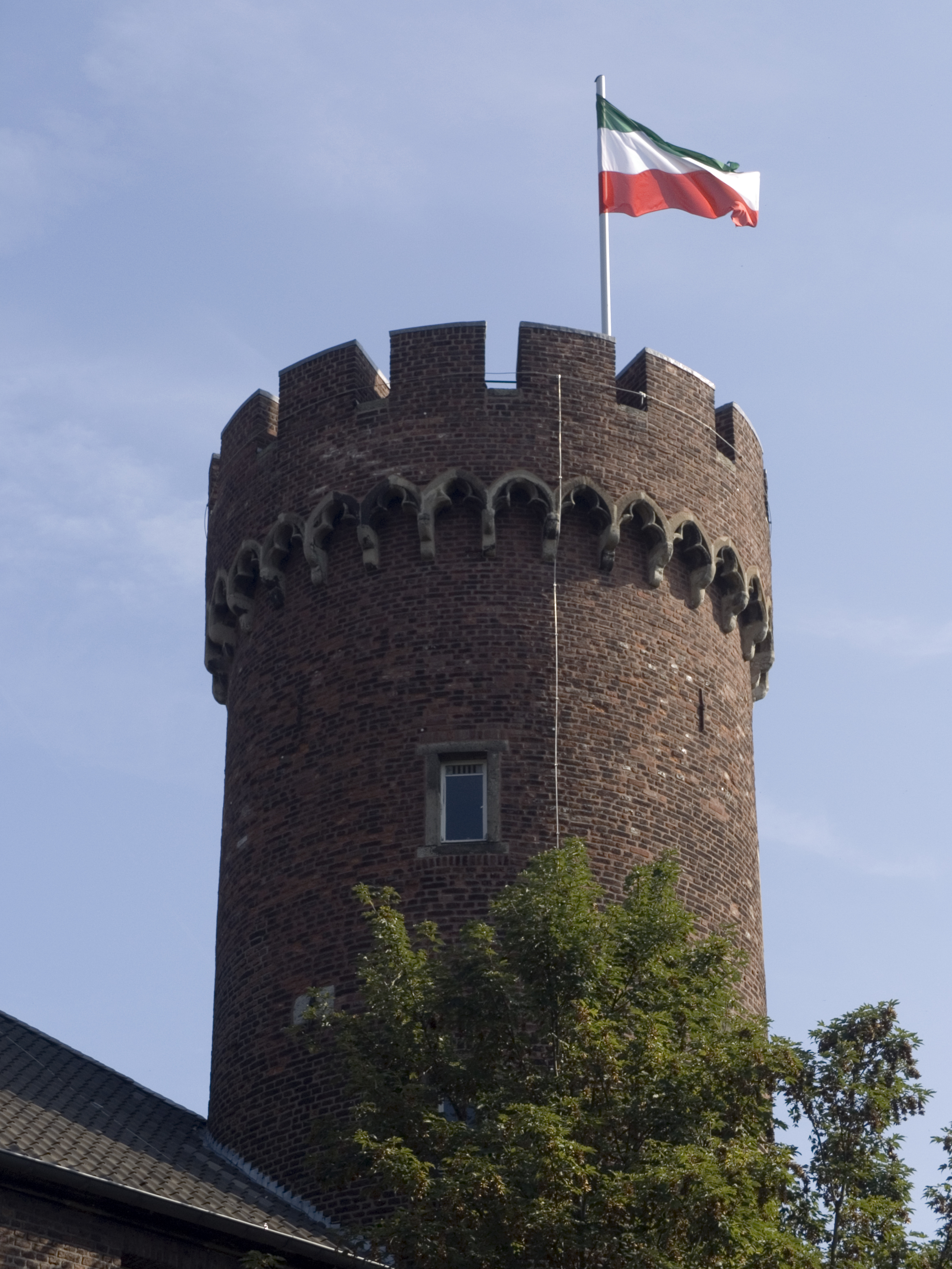 Turm der Burg Kempen